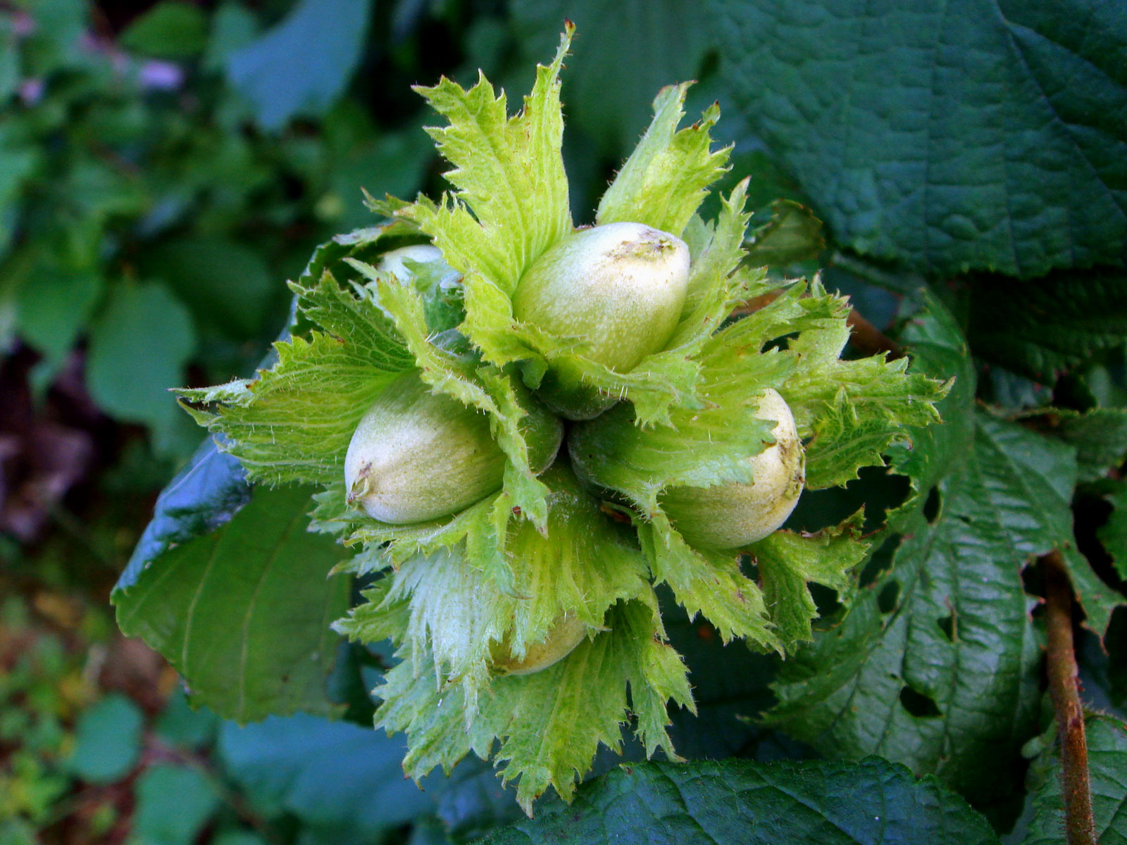 Орехи лещины.